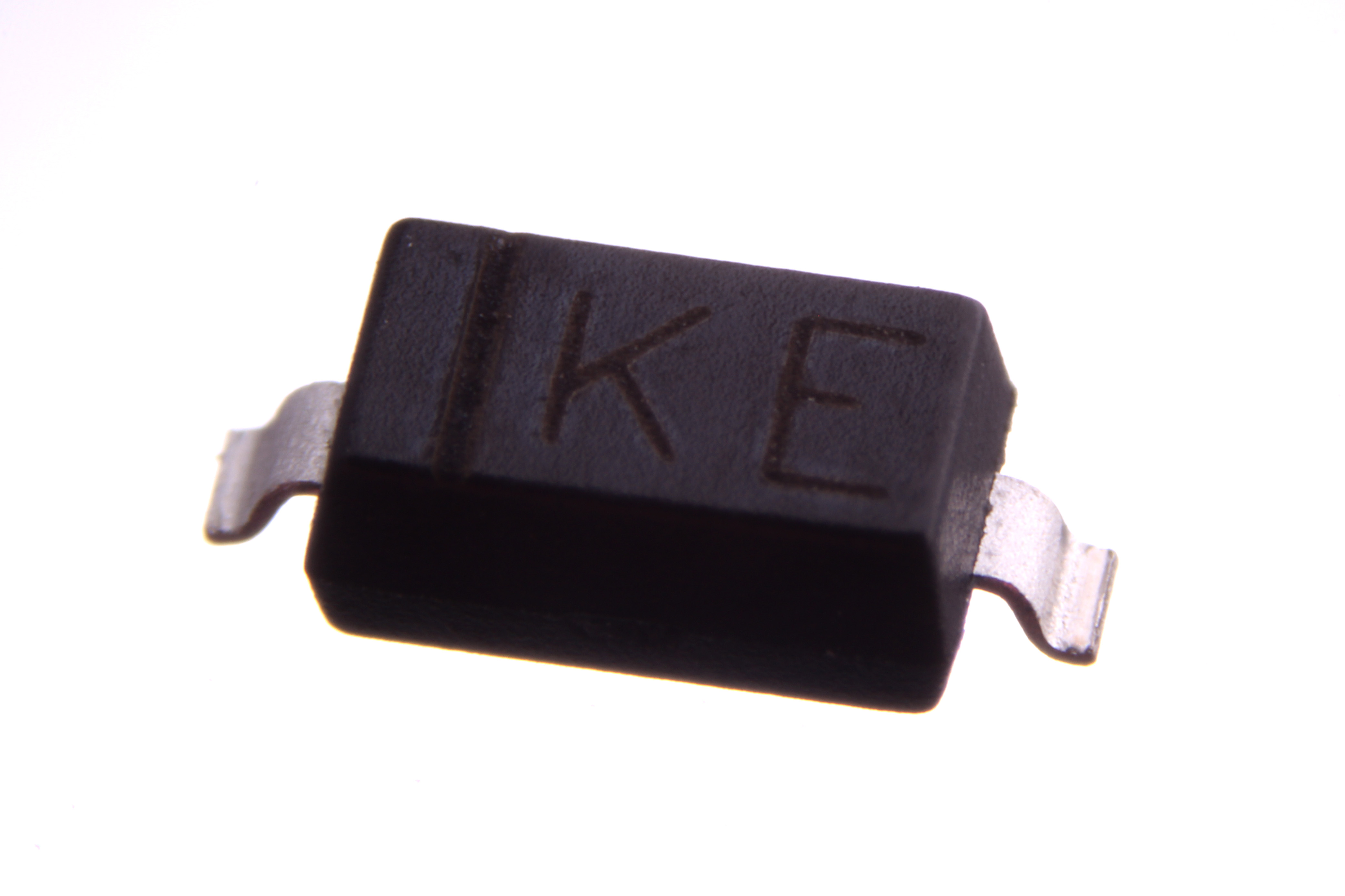 Diode in SOD-123 package.